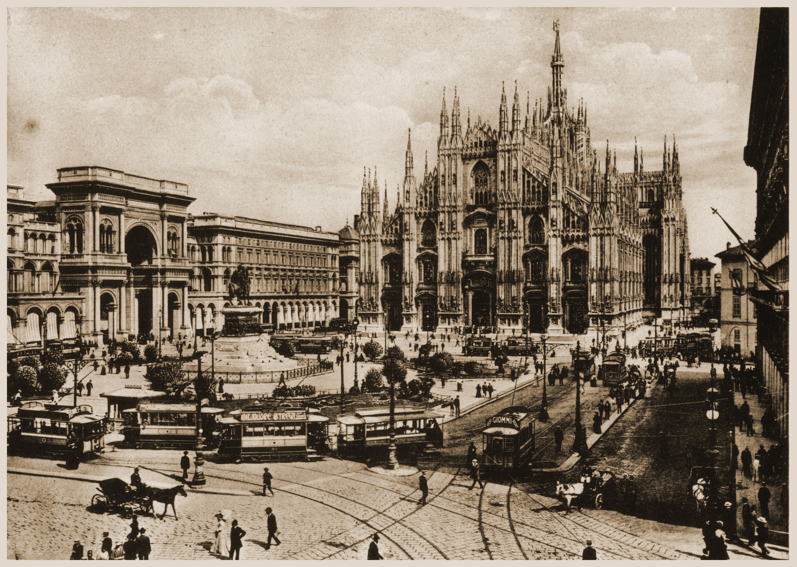 Piazza Duomo a Milano all'inizio del XX secolo.